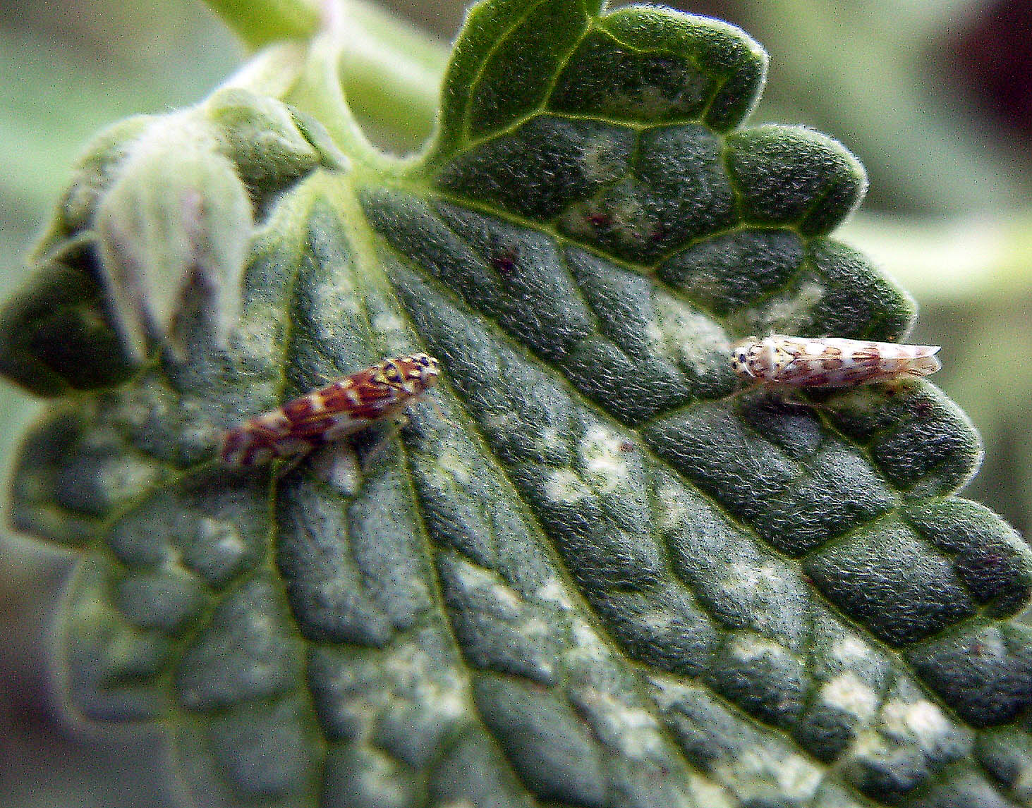 Gartenblattzikade (Eupteryx florida) links, Eibischblattzikade (Eupteryx melissae) rechts an Katzenminze (Nepeta cataria), Garten in Niedersachsen